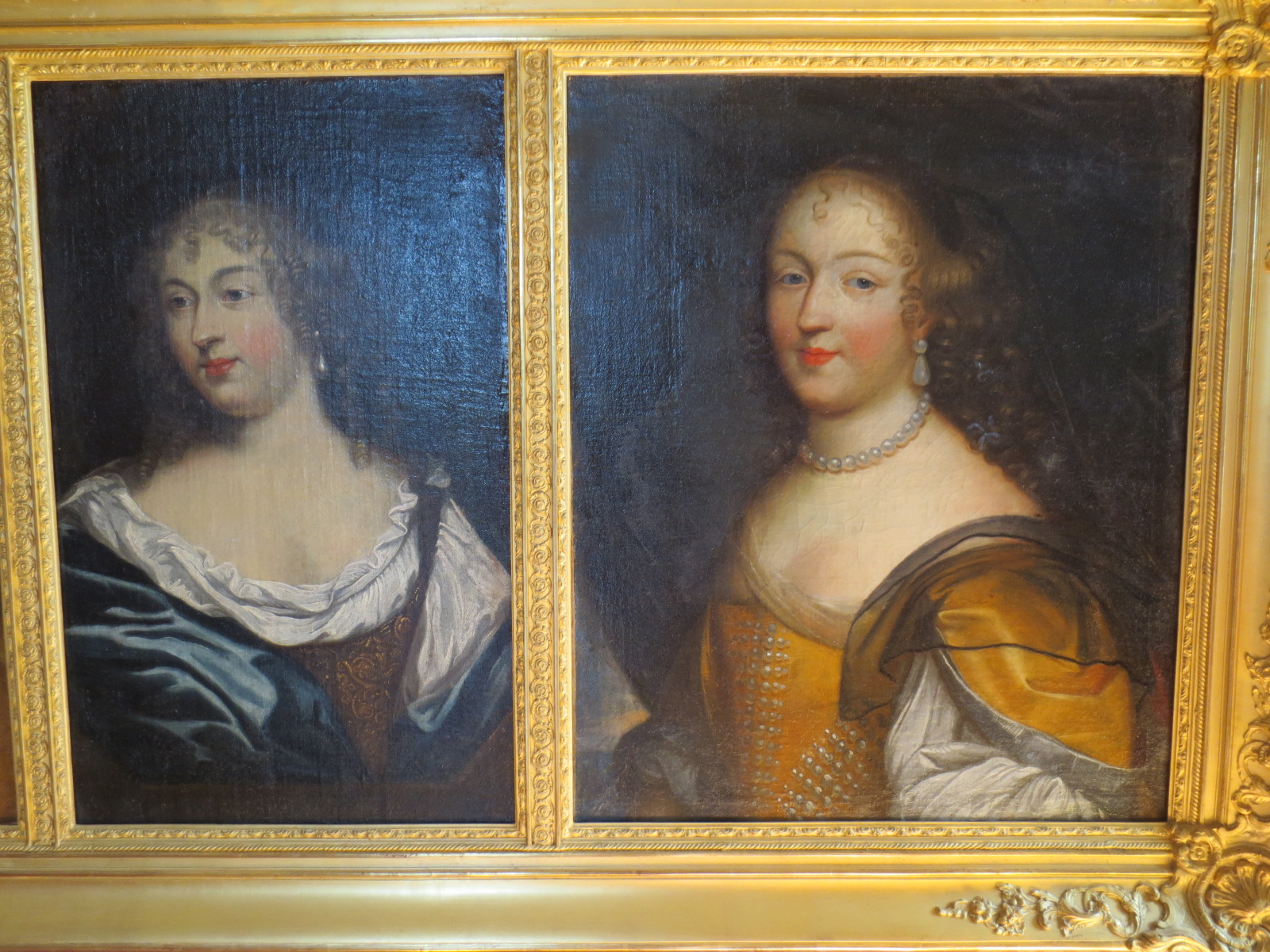 Château de Bussy-Rabutin; à droite la fameuse comtesse de Sévigné, à gauche sa fille Françoise-Marguerite de Grignan.